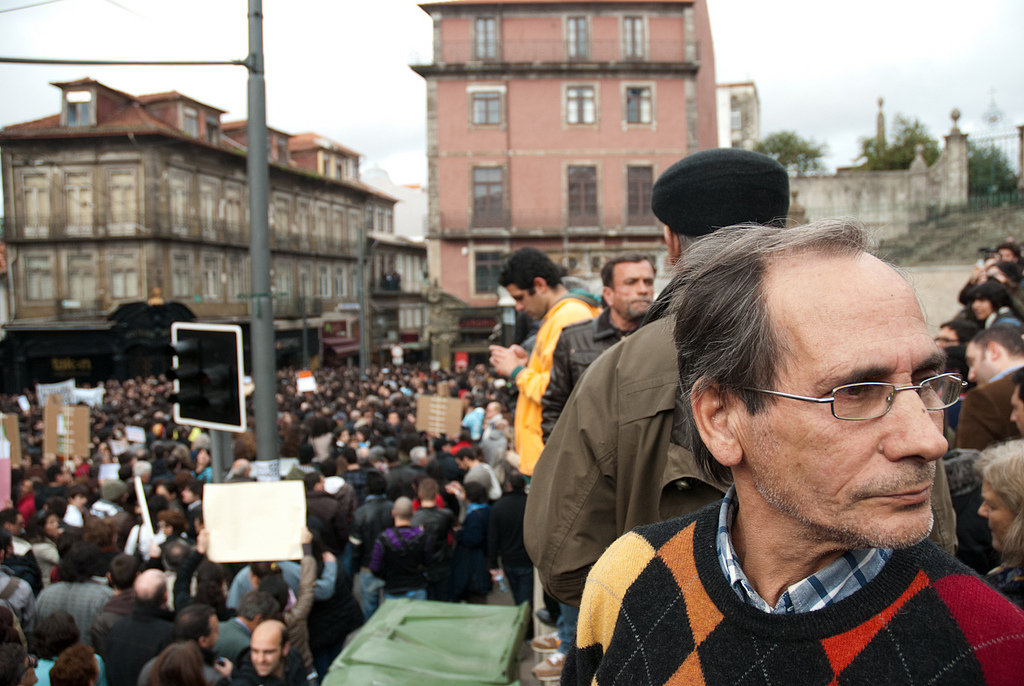 Manifestantes durante os protestos da no Porto, Portugal, 12 de Março de 2011.